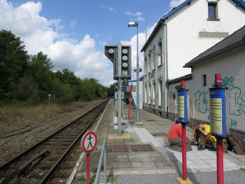 station Philippeville, Belgium